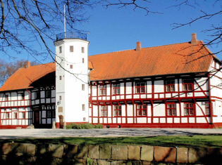 Rudbjerggaard